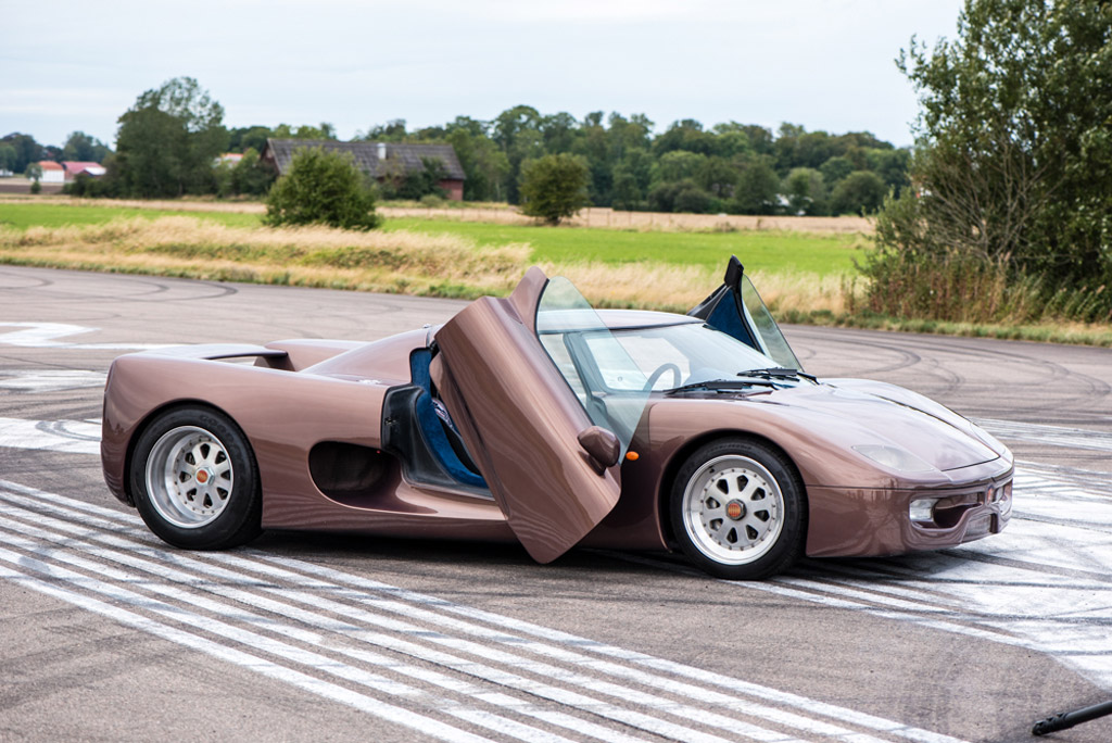 La Koenigsegg CC8S prototype no4 (CC) a Ängelholm, sur la piste d'essai de Koenigsegg